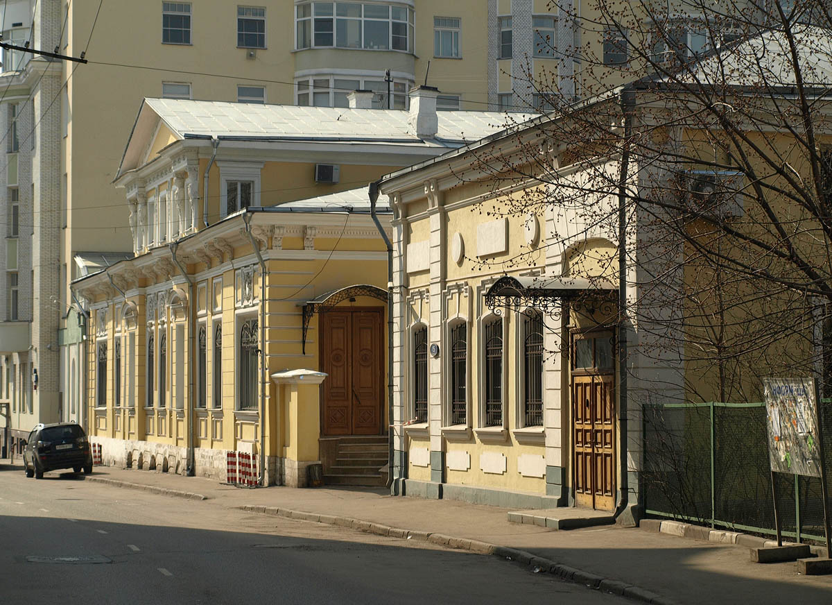 15, Trubnikovsky Lane, Moscow.